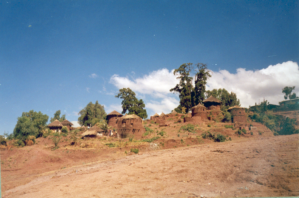 Häuser im äthiopischen Lalibela